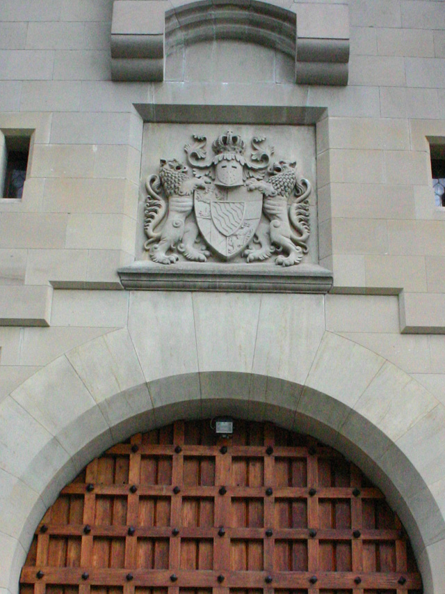 II. Ludwig címerpajzsa a neuschwansteini kastély bejárata fölött, Németország